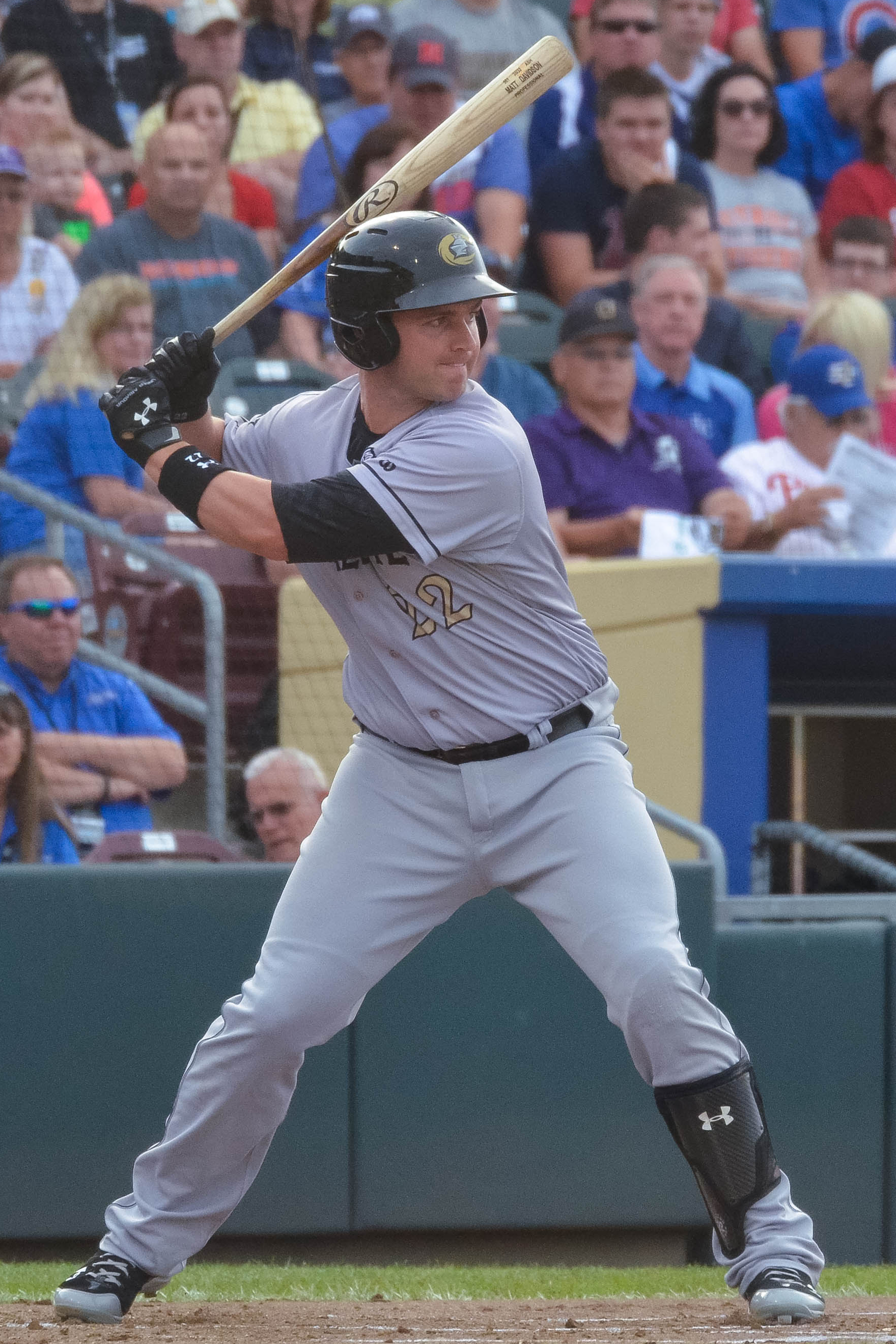 Matt Davidson